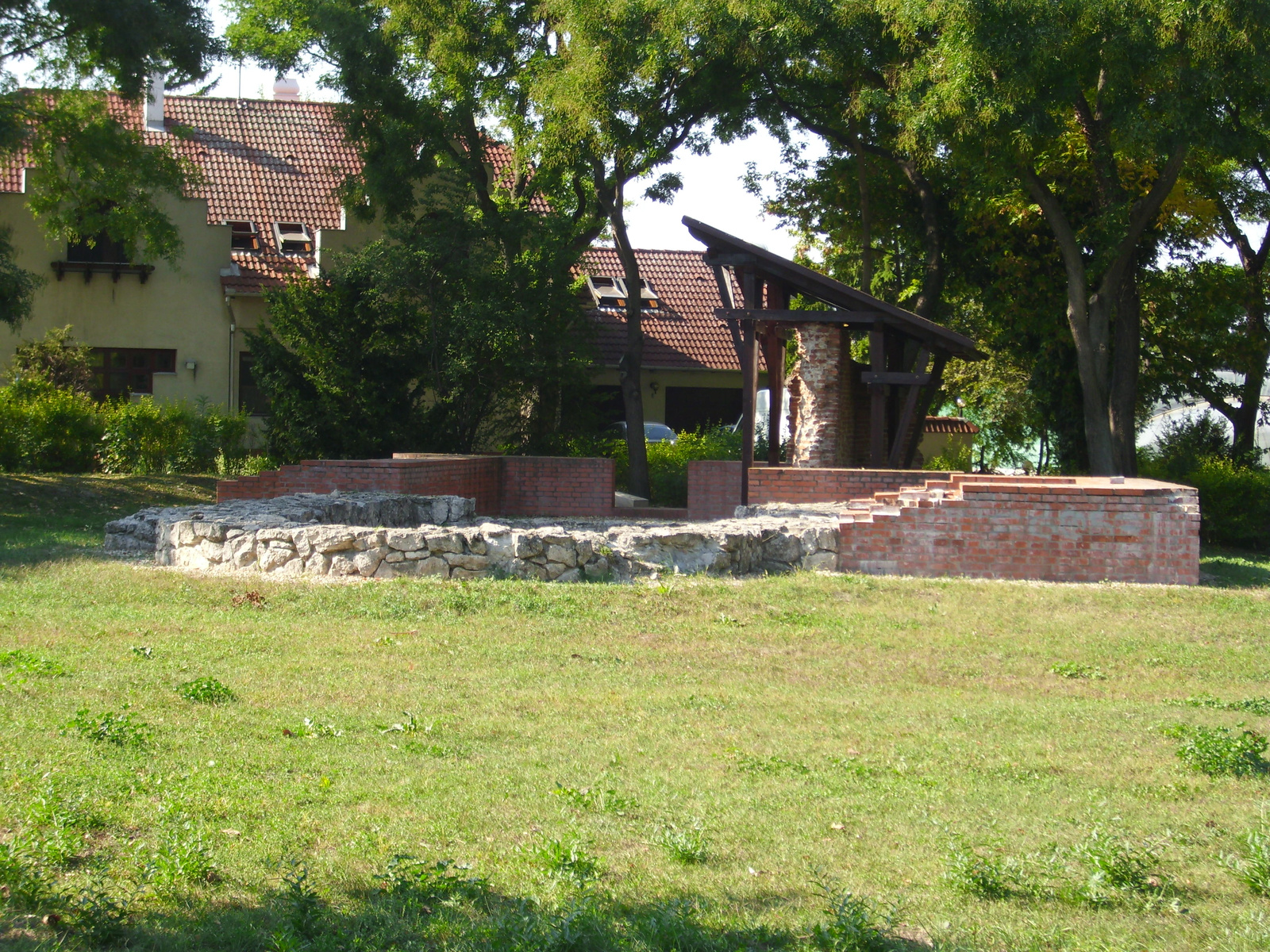 Templomrom (Szeged, SZŐREG) This is a photo of a monument in Hungary, Identifier: 3524